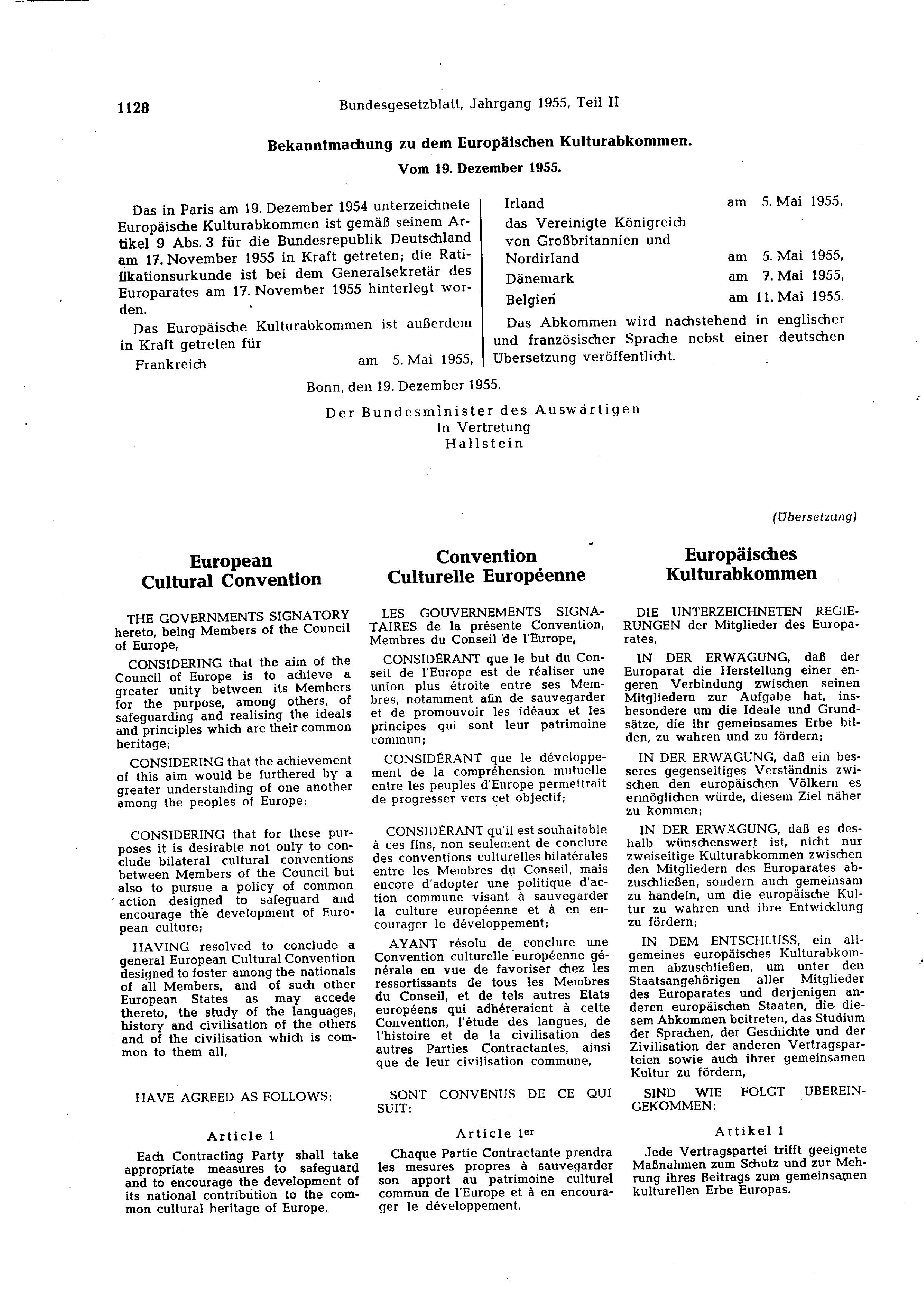 Europäisches KulturabkommenSeite 1, Seite 2, Seite 3, Seite 4, Seite 5